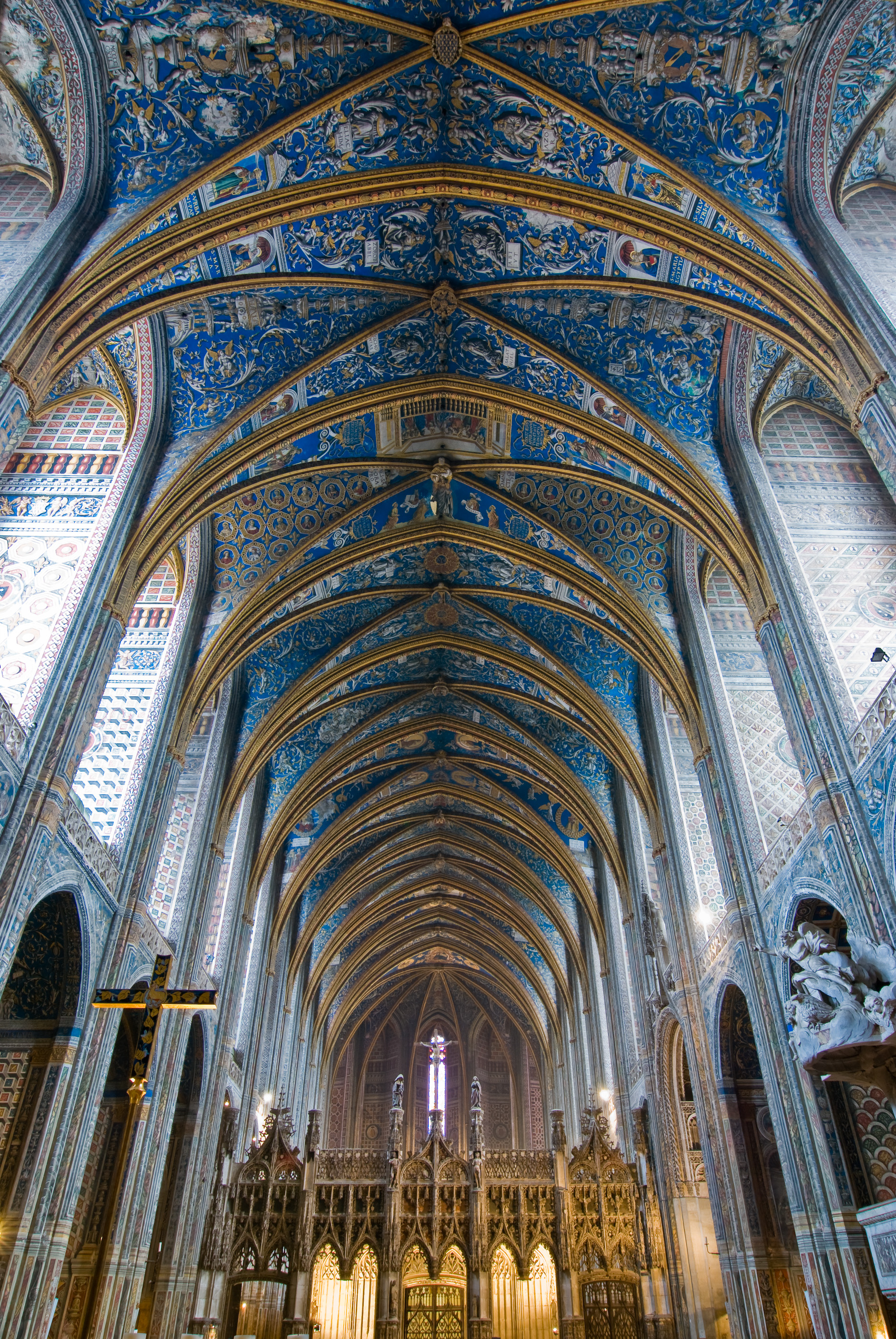 Vue d'ensemble de l'intérieur de la cathédrale, pris sous le buffet d'orgues (Cathédrale Sainte-Cécile, Albi)